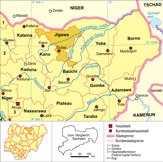 politische Karte Nigerias (Bundesstaat Jigawa hervorgehoben)